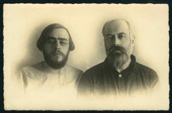 Fléchine, Senya. / Ejchenbaum, Vsevolod Michajlovič (Voline) / 1917